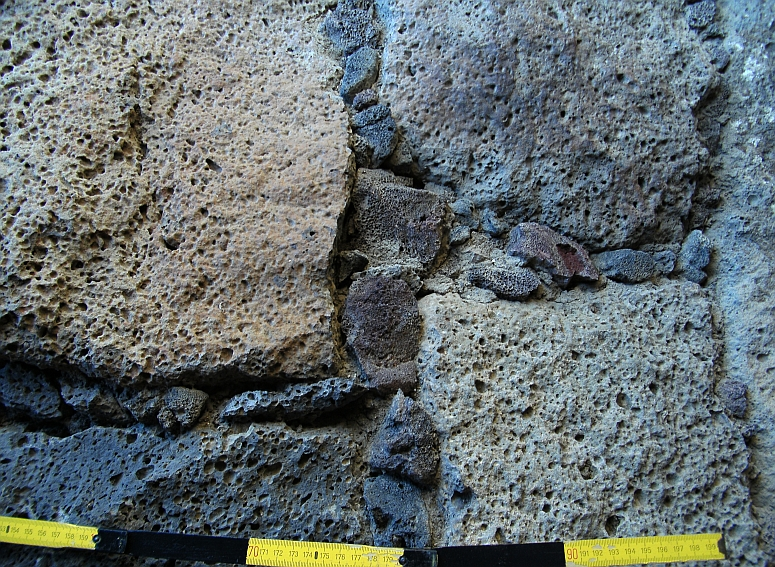 Fugetechnik im Hauptturm